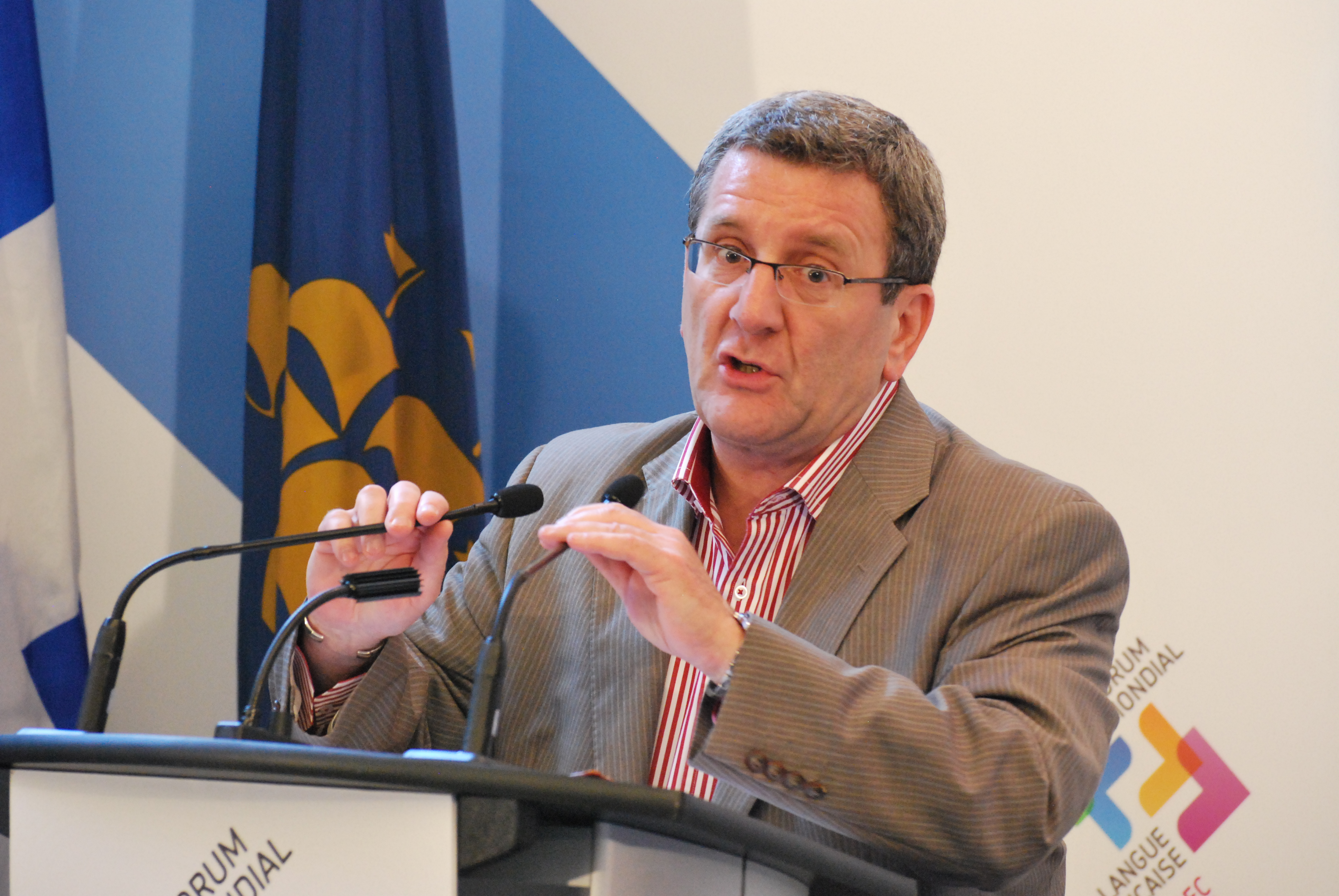 Régis Labeaume au Forum mondial de la langue française